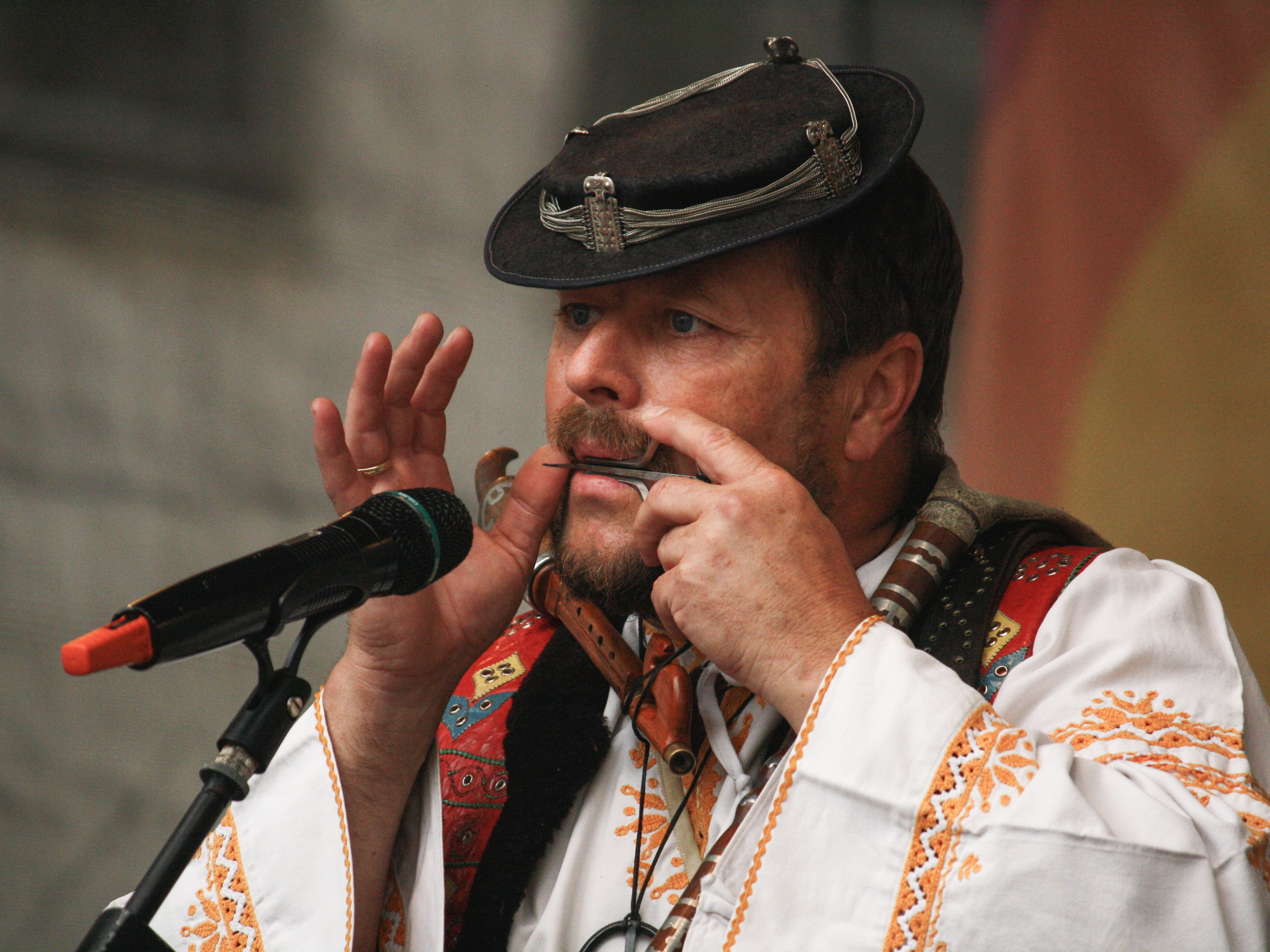 7. mezinárodní folklórní festival Pražský jarmark - slovenský výrobce a hráč na lidové nástroje This photograph was taken with a DSLR from WMCZ's Camera grant.